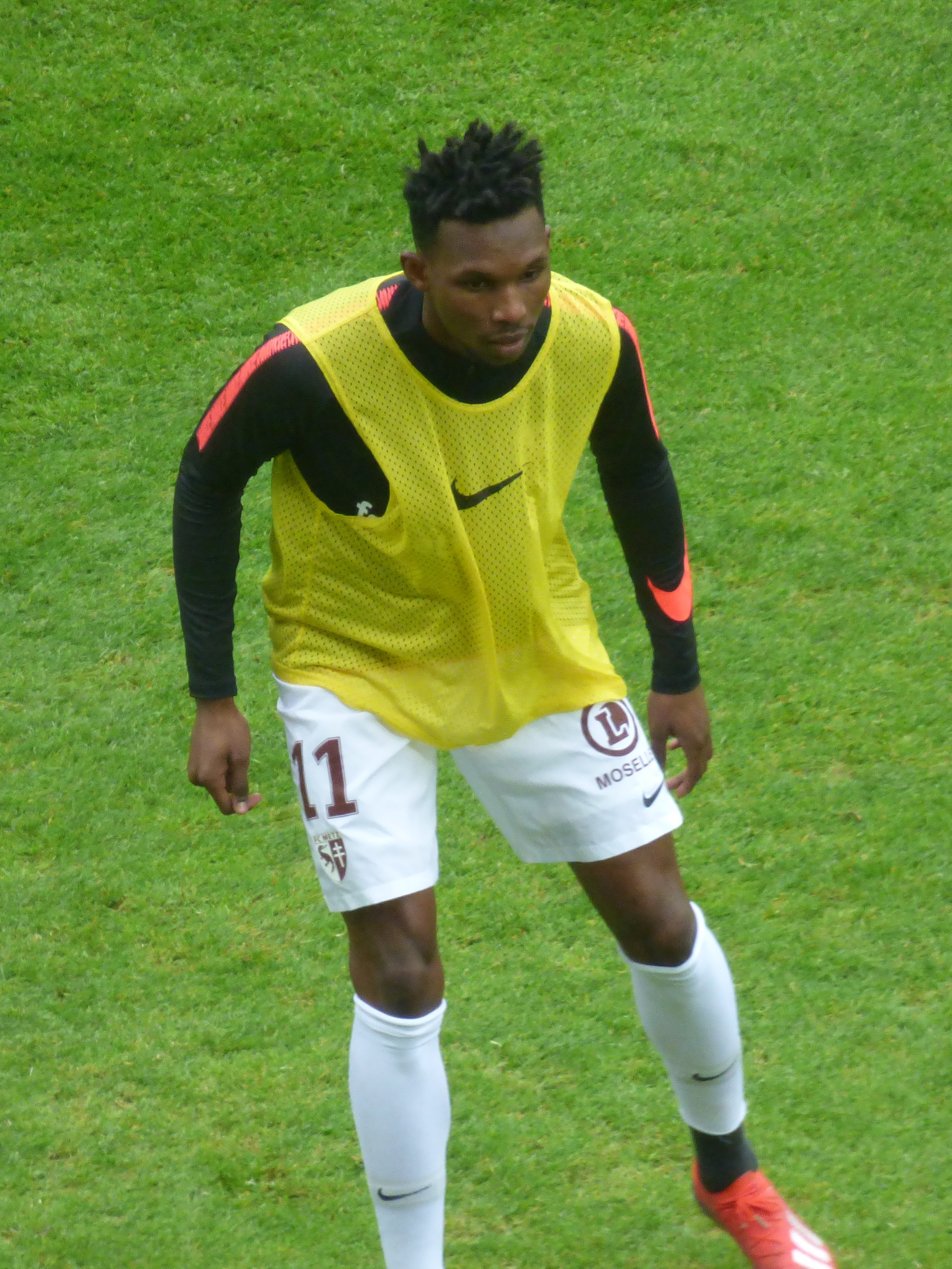 Opa Nguette avant le match RC Lens / FC Metz, comptant pour la vingt-quatrième journée du championnat de France de Ligue 2 2018-2019, le 9 février 2019, au Stade Bollaert-Delelis.